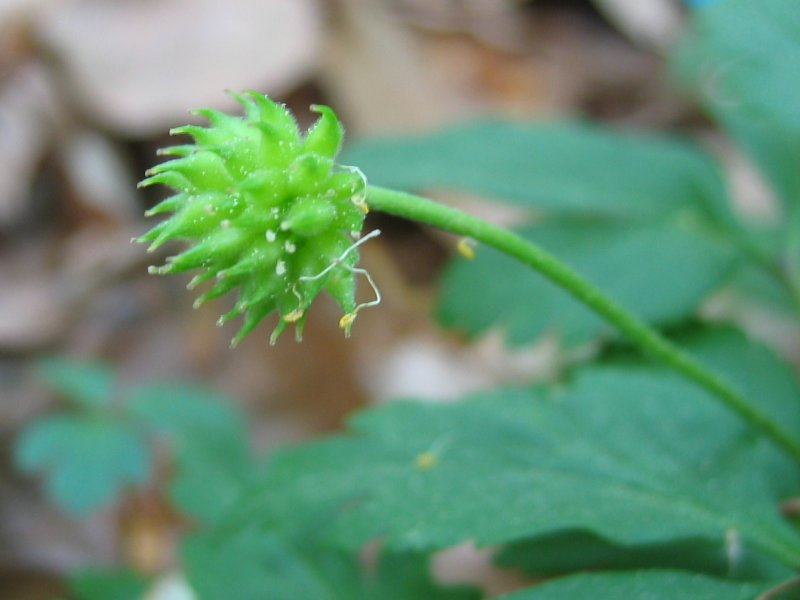 Buschwindröschen Anemone nemorosa, Nähe Rostock